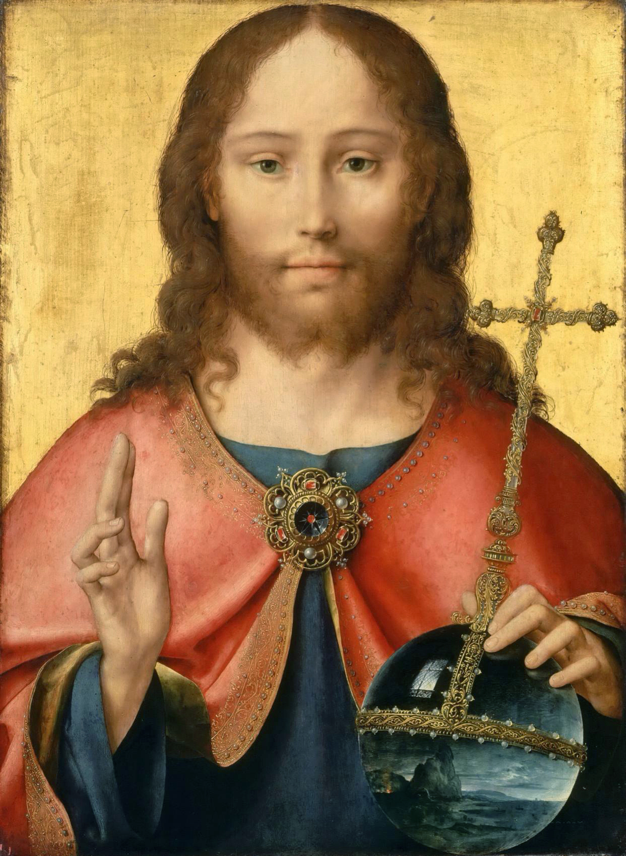 Le Christ en Salvator Mundi